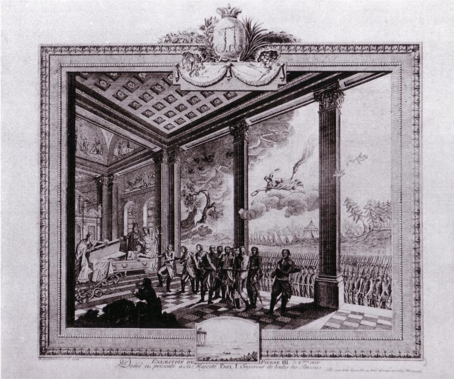 Эксгумации Петра III посвящена эта аллегорическая гравюра Николая Анселена